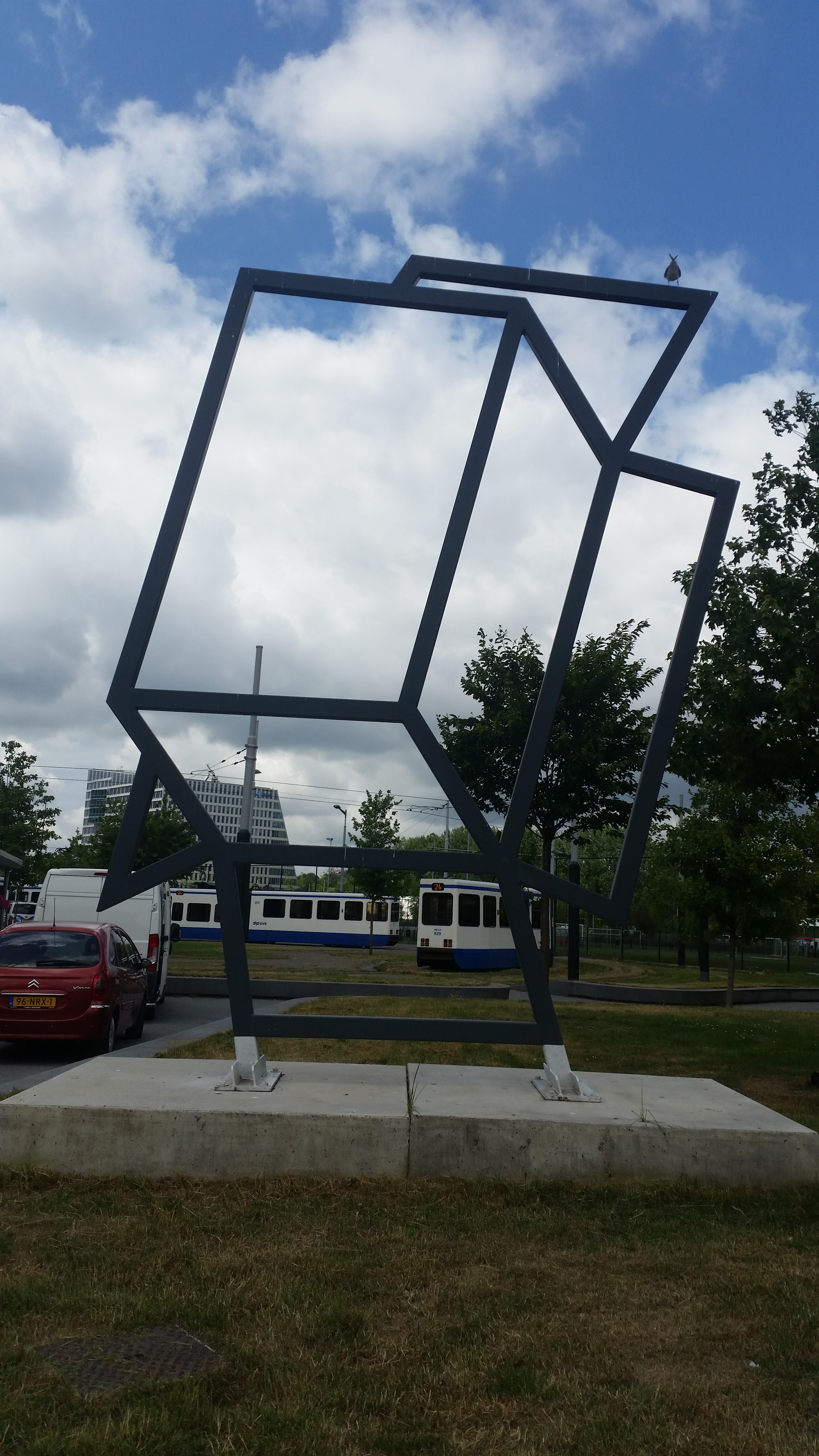 De doos van Jeroen Henneman, De Boelelaan, Amsterdam-Zuid